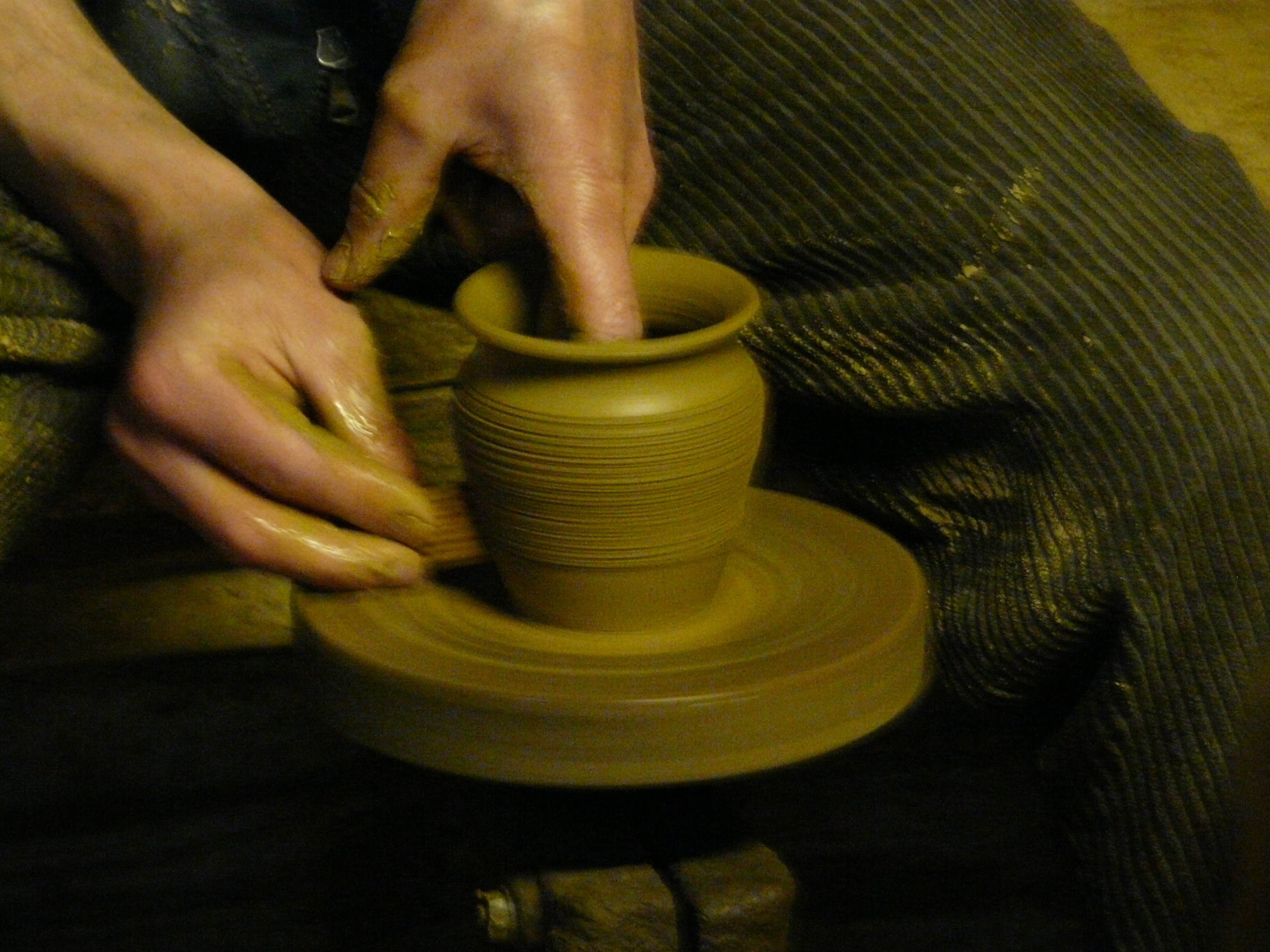 Grarncarz w Rabce / Potter in Rabka